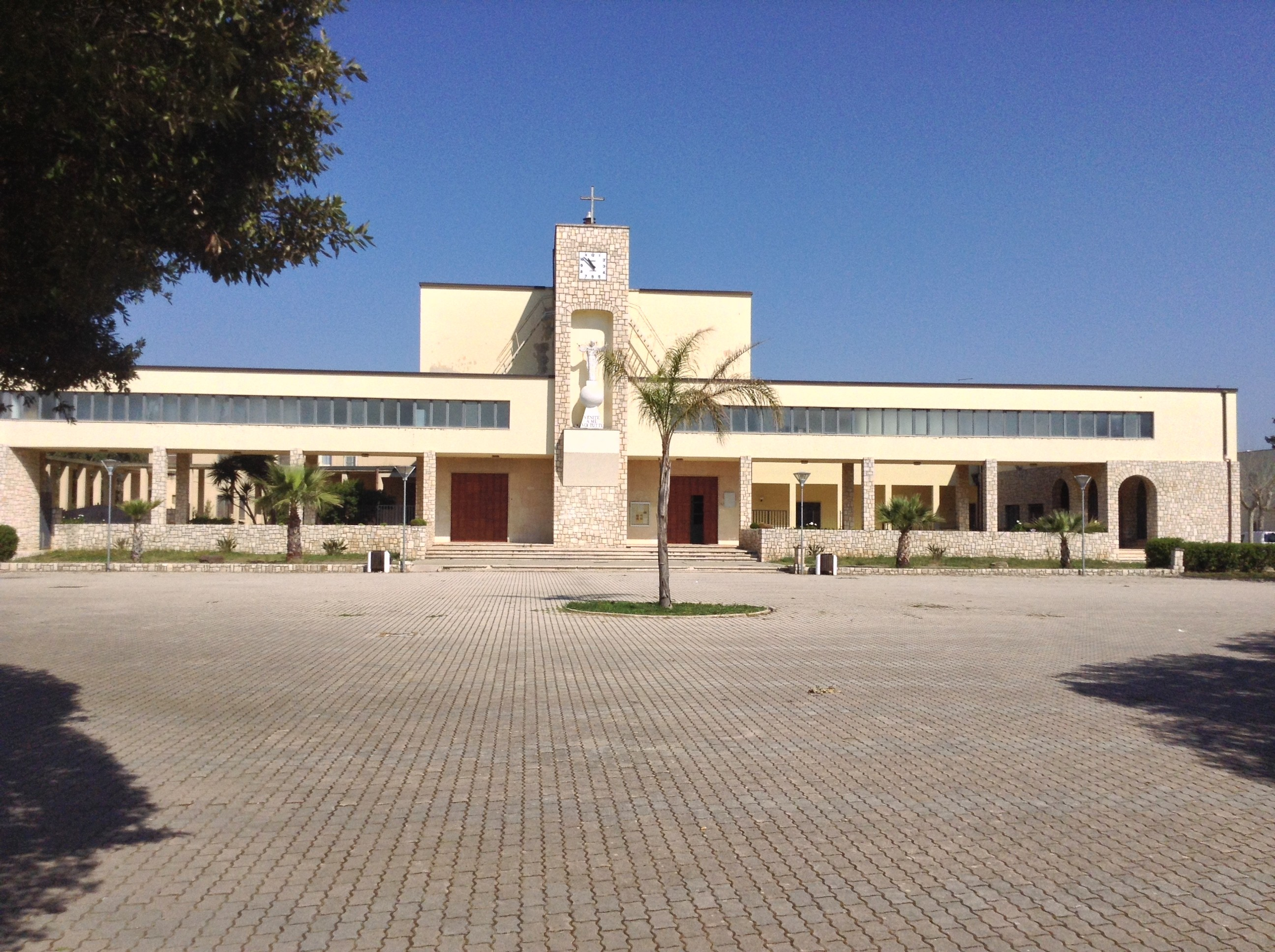 Chiesa San Leone Magno